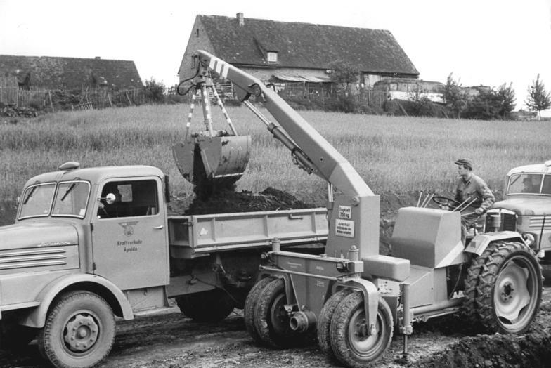 Apolda, Bau eines Rinderstalls Zentralbild Naundorf Vgt-Noa 8.6.1959 Anwendung modernster Technik in der Landwirtschaft Die MTS Apolda - Heusdorf erhielt einen im VEB Rotes Banner. Döbeln, neuentwickelten hydraulischen Mistlader, der auch als Erdbagger eingesetzt werden kann. Zum Be- und Entladen von Fahrzeugen ist das Gerät ebenfalls geeignet. UBz: Der Mistlader als Erdbagger beim Ausschachten der Fundamente für den Rinderoffenstall der LPG "Thomas Müntzer" in Apolda-Heusdorf.